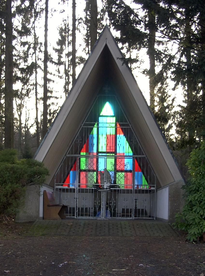 Neues Ehrenmal in Voßwinkel